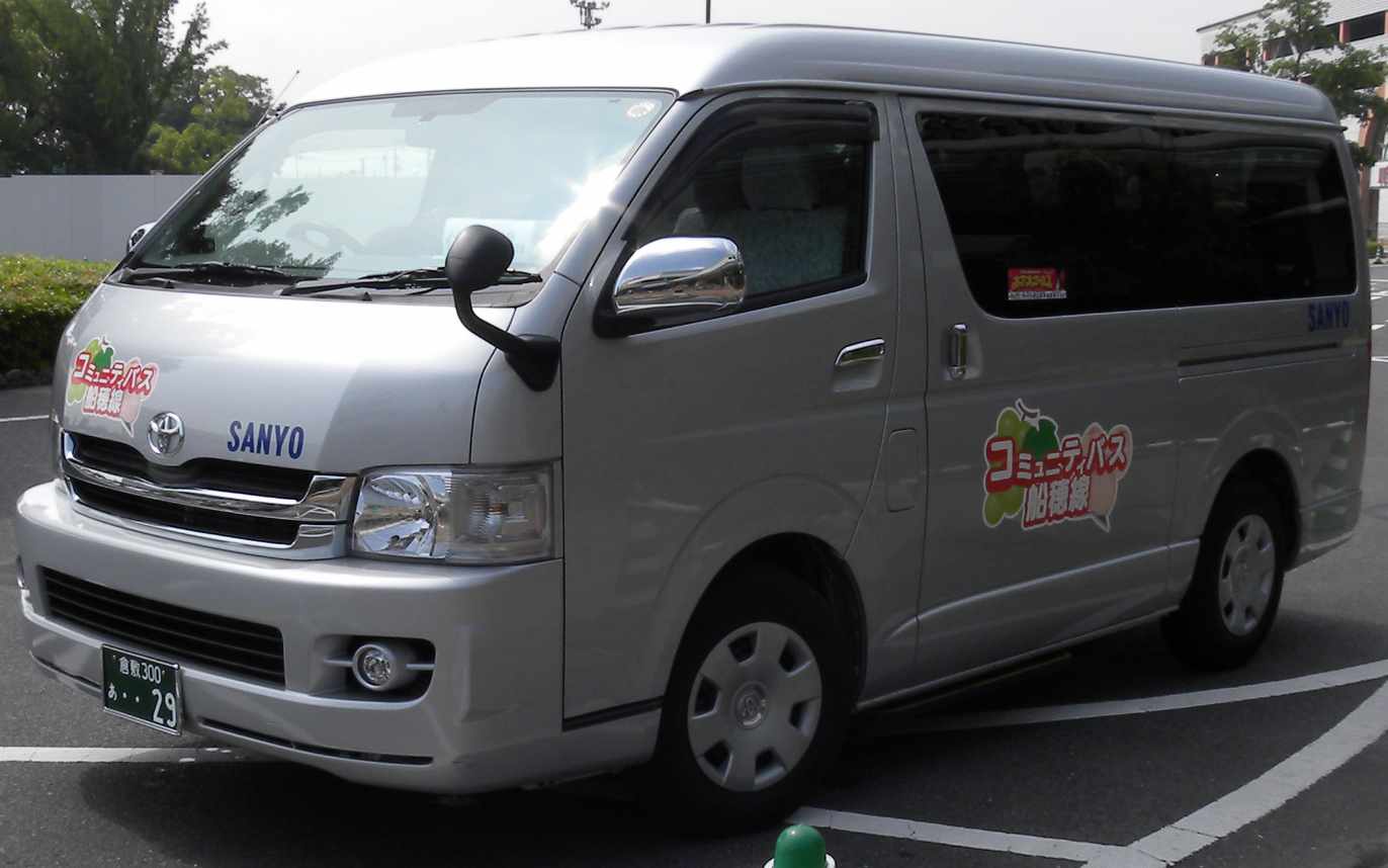 山陽タクシー（岡山県） 船穂地区コミュニティバスの車両